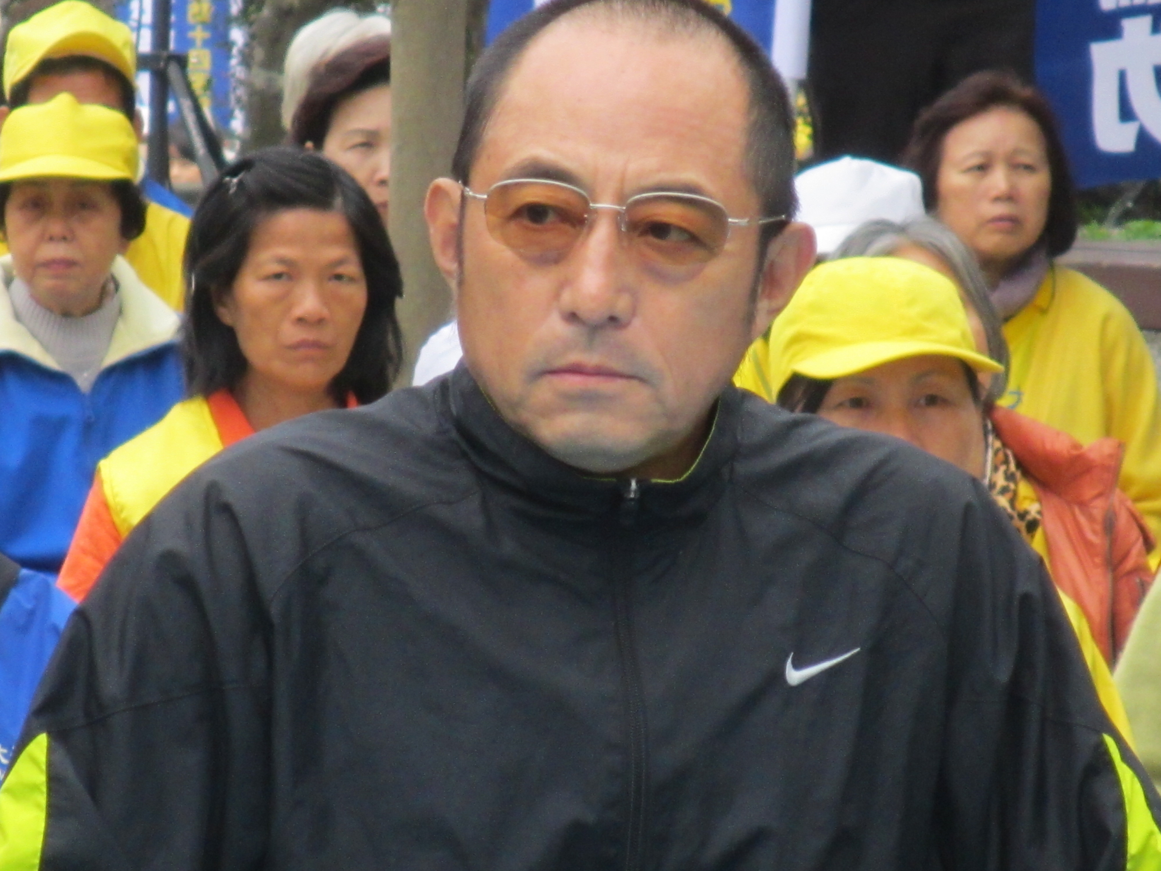 中国流亡作家 袁红冰 （美国之音张永泰拍摄）